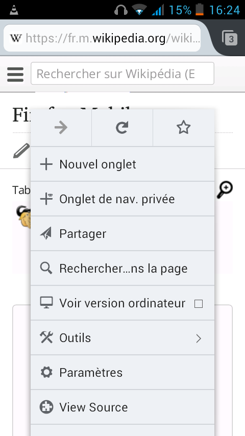 Capture d'écran de l'interface de firefox pour Android en français